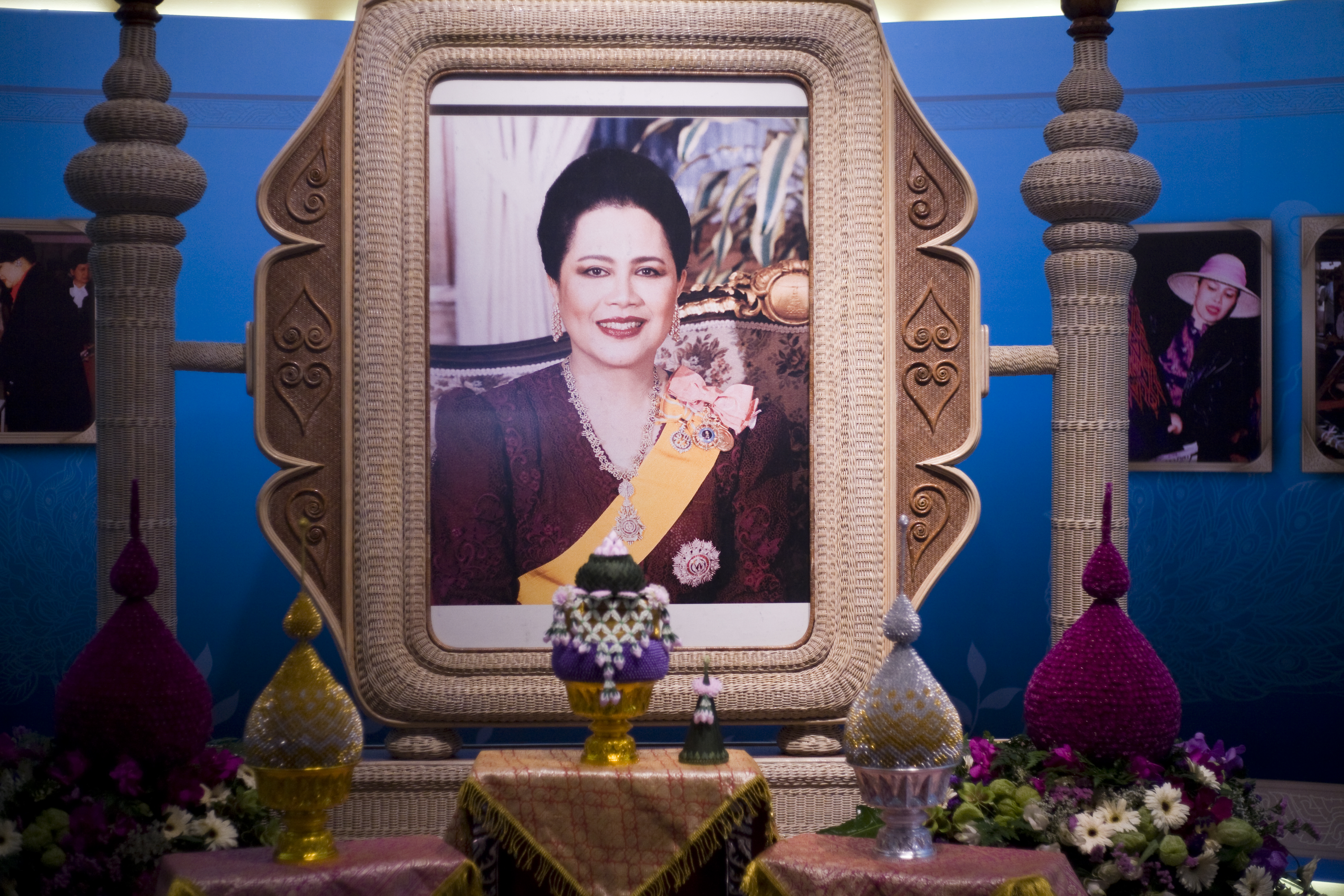 นายกรัฐมนตรี เป็นประธานพิธีเปิดงานมหกรรมวัฒนธรรมเฉลิมพระเกียรติสมเด็จพระนางเจ้าฯ พระบรมราชินีนาถ ณ หอประชุมเล็ก ศูนย์วัฒนธรรมแห่งประเทศไทย กรุงเทพฯ 8สิงหาคม2552 (The Official Site of The Prime Minister of Thailand Photo by พีรพัฒน์ วิมลรังครัตน์)